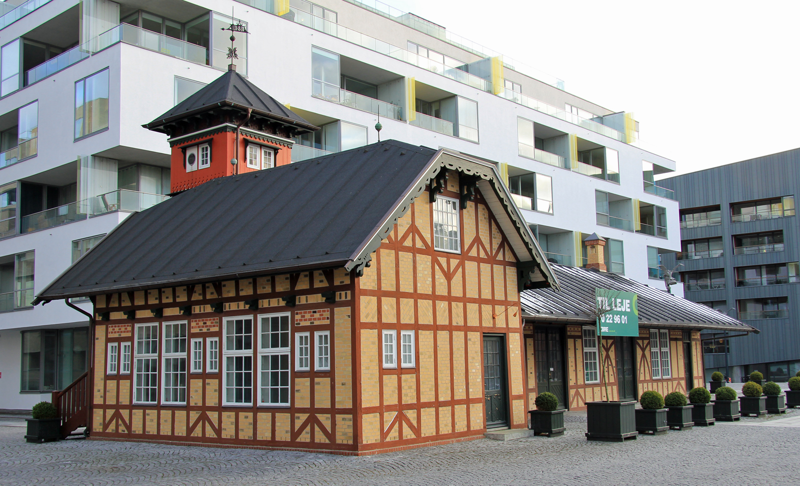 Frihavnens Stationsbygning